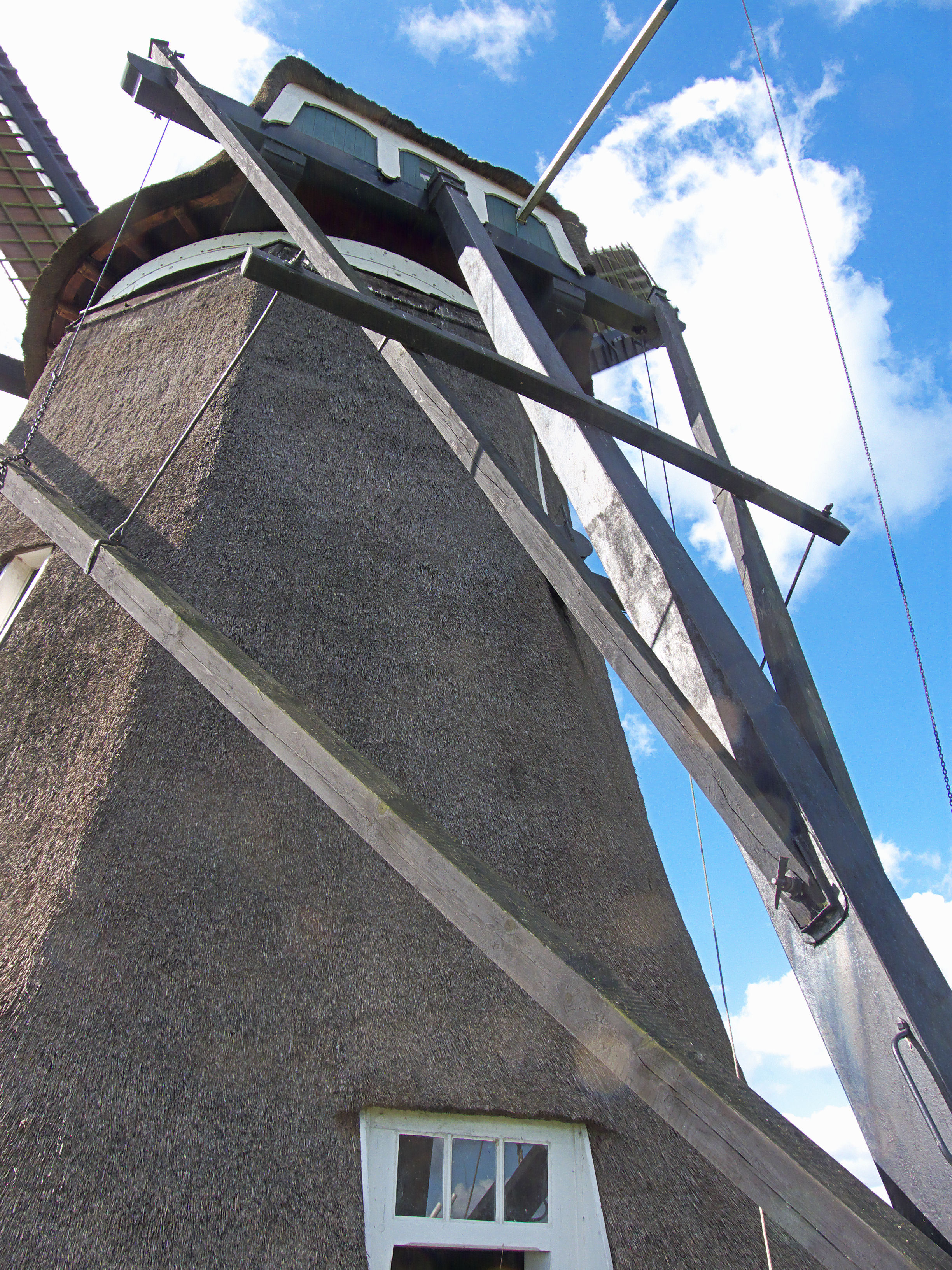 Achtkante molen met galghout